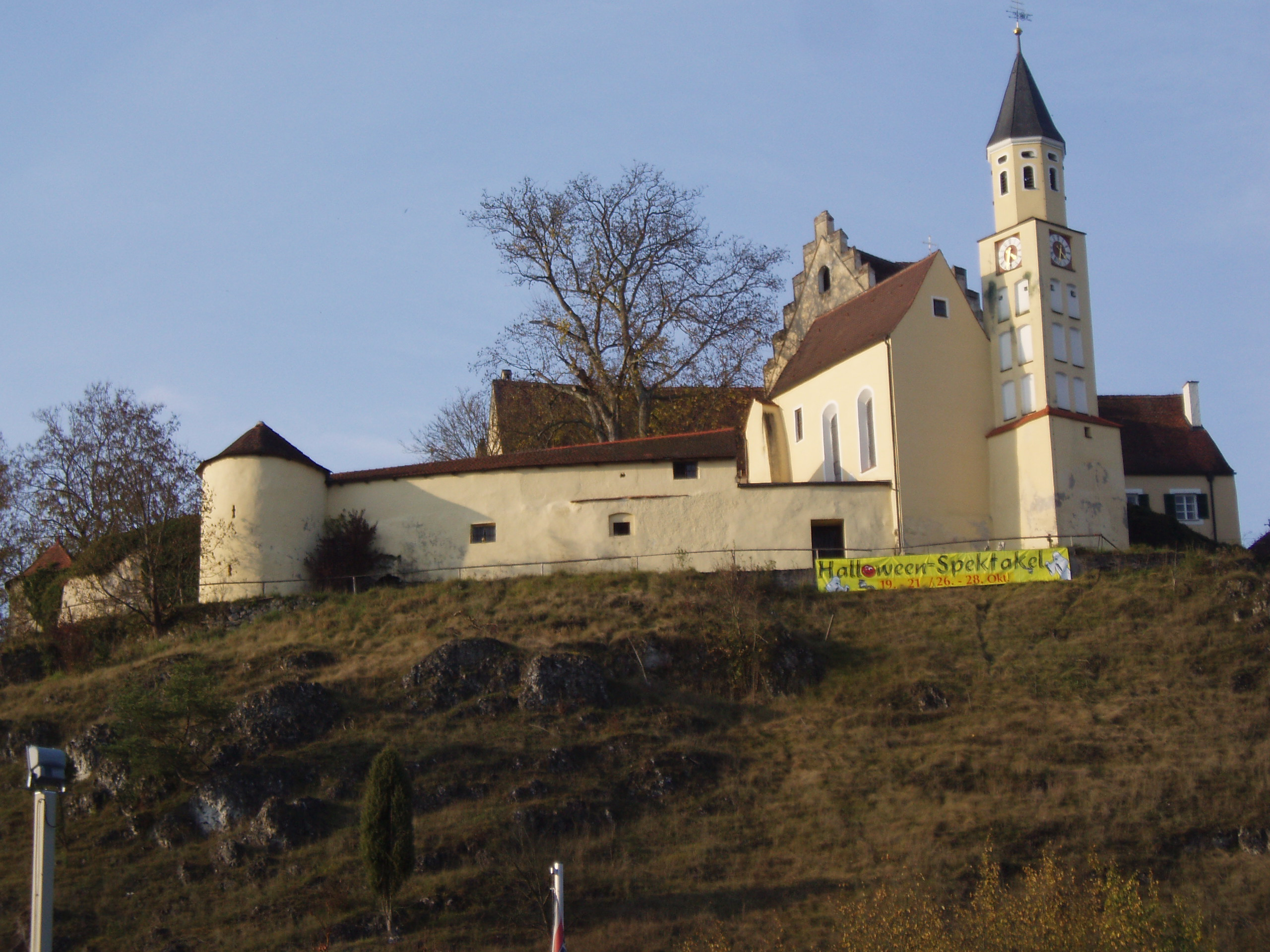 Schloss Hexenagger im Landkreis Eichstätt